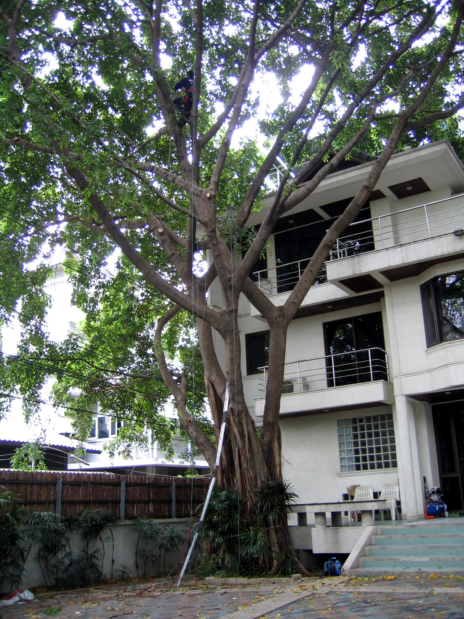 Arborist at work: photo taken by usre Huristics on 3/4/2006